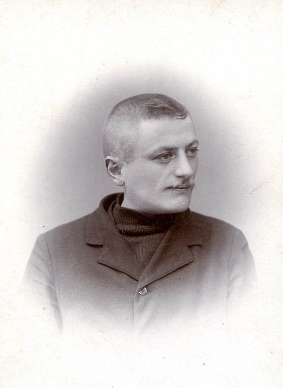 Johan Brautigam (Uithoorn, 18 mei 1878 - Rotterdam, 24 juni 1962) was een Nederlandse vakbondsbestuurder en politicus. Hij was de grondlegger van de Bond van Transportarbeiders en voorman van de SDAP te Rotterdam. -- Foto uit de nalatenschap van Johan Brautigam, ongeveer 100 jaar oud (anno 2009)